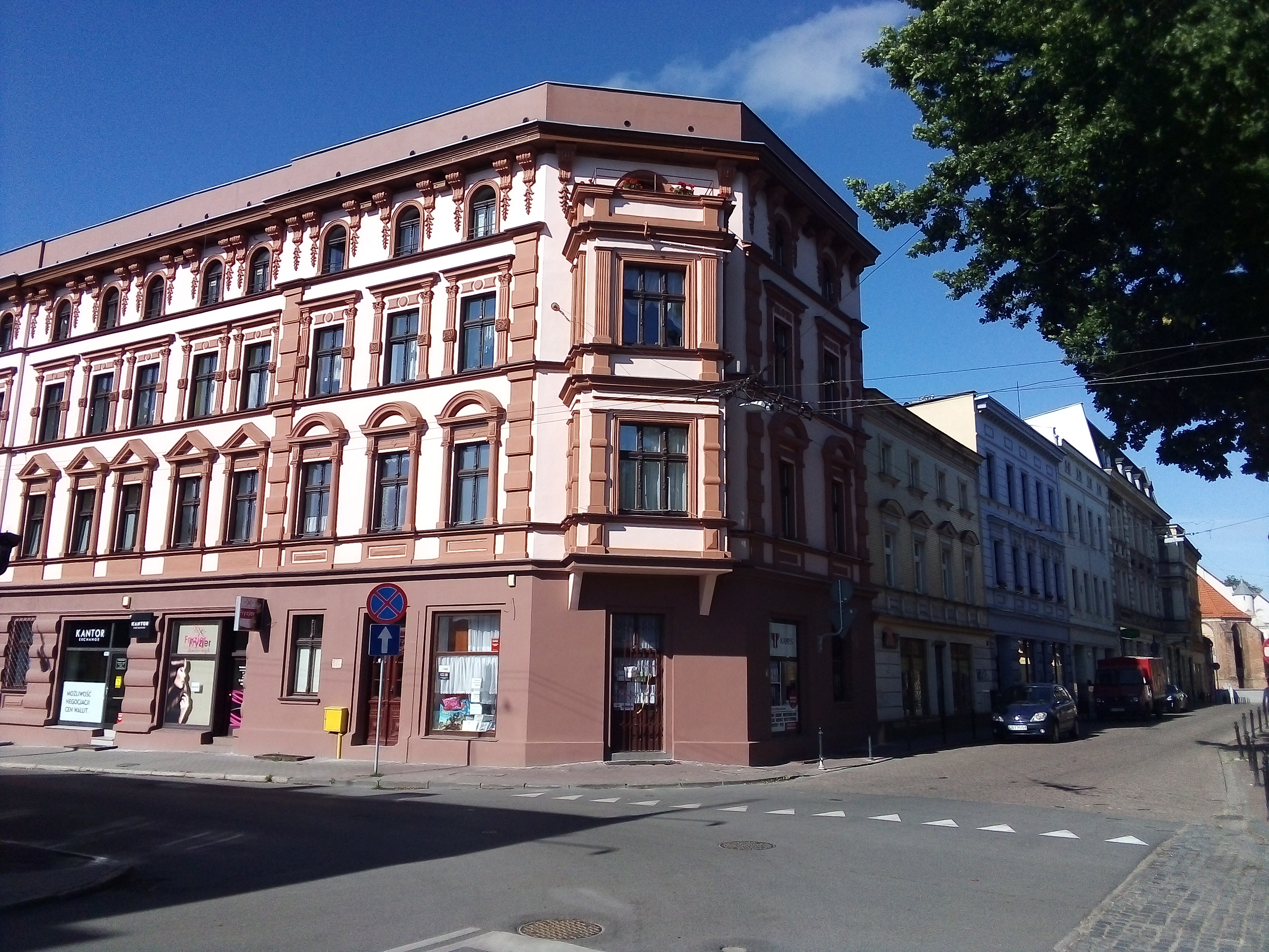 Widok na ul. Kasztelańską ze skrzyżowania z ul. Poznańską. W głębi widoczny kościół św. Mikołaja.